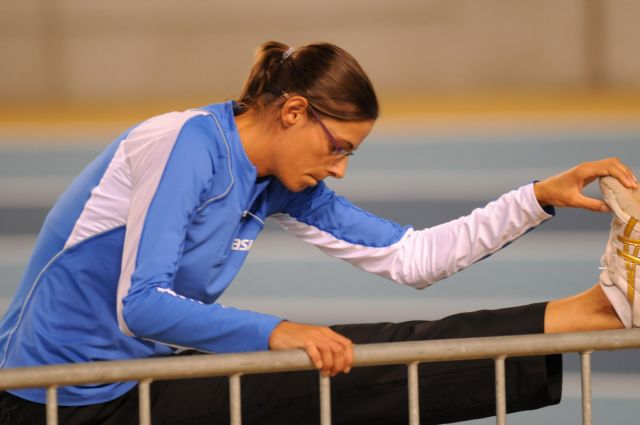 Tia Hellebaut during open NK Indoor Meerkamp 2008